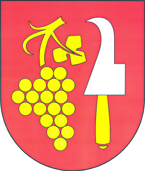 Znak obce Neslovice